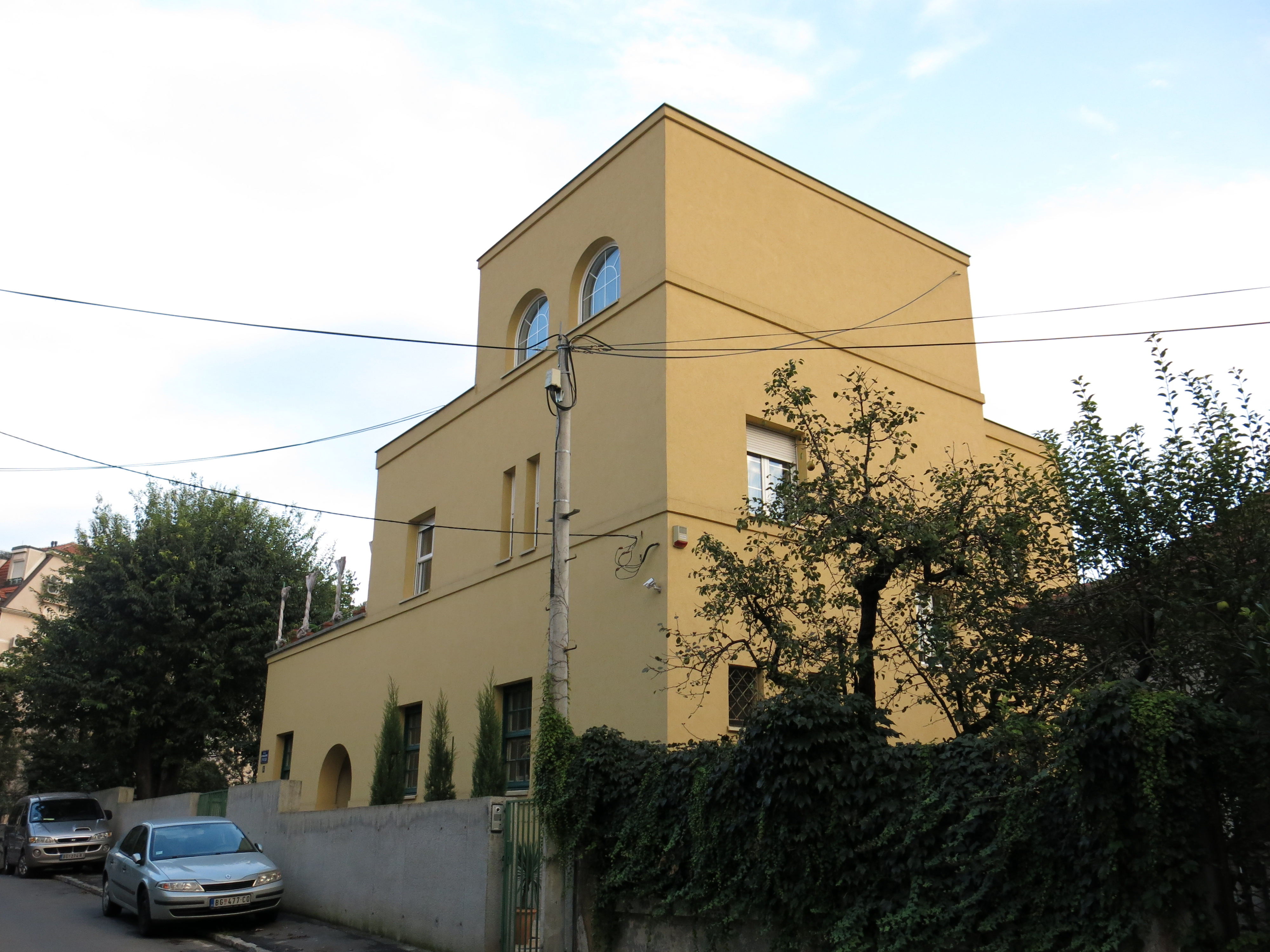 Кућа арх. Милана Злоковића